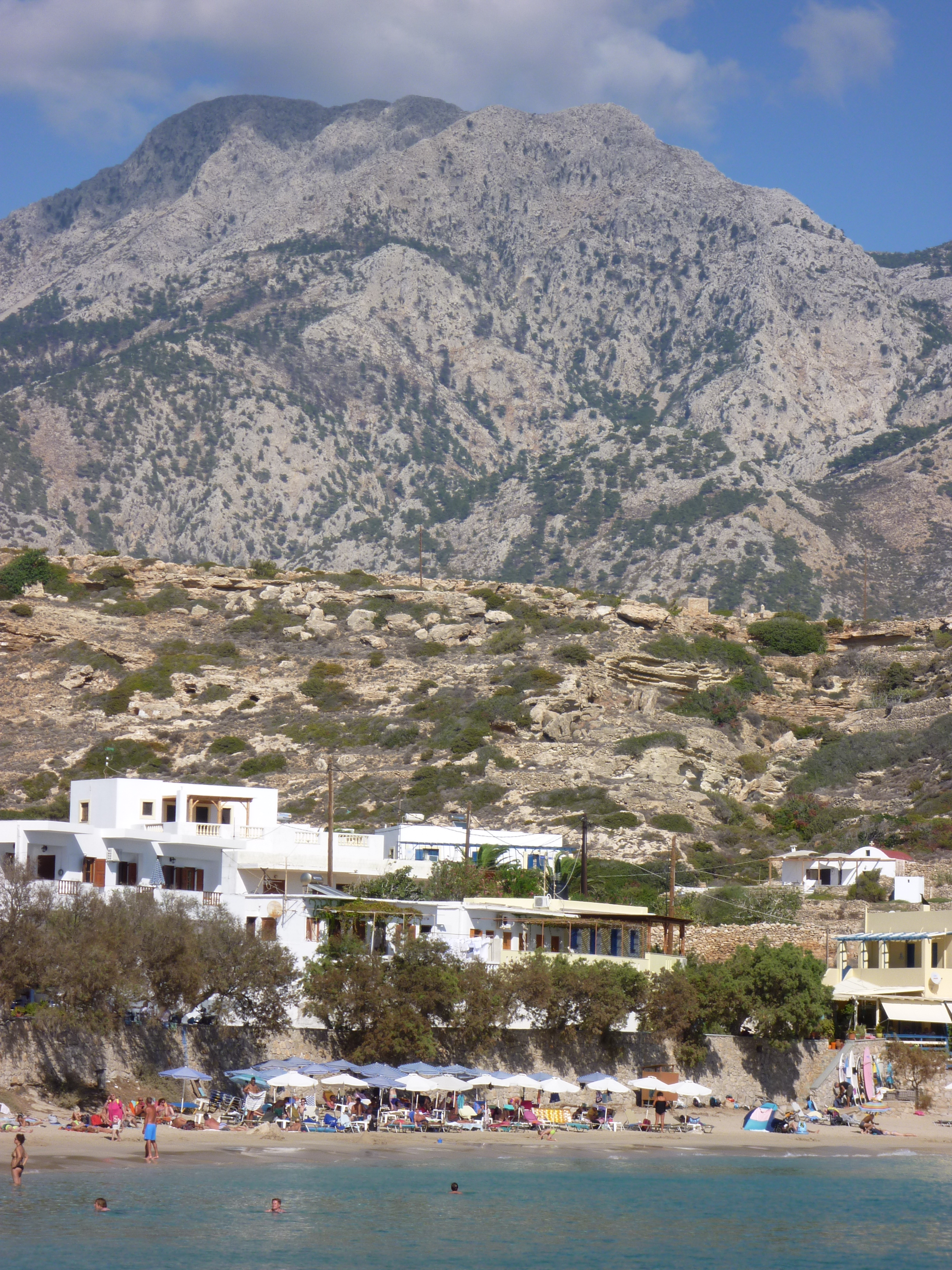 Blick über die Bucht von Lefkos mit dem Bergmassiv des 1215 m hohen Kali Limni im Hintergrund; Karpathos - Griechenland.